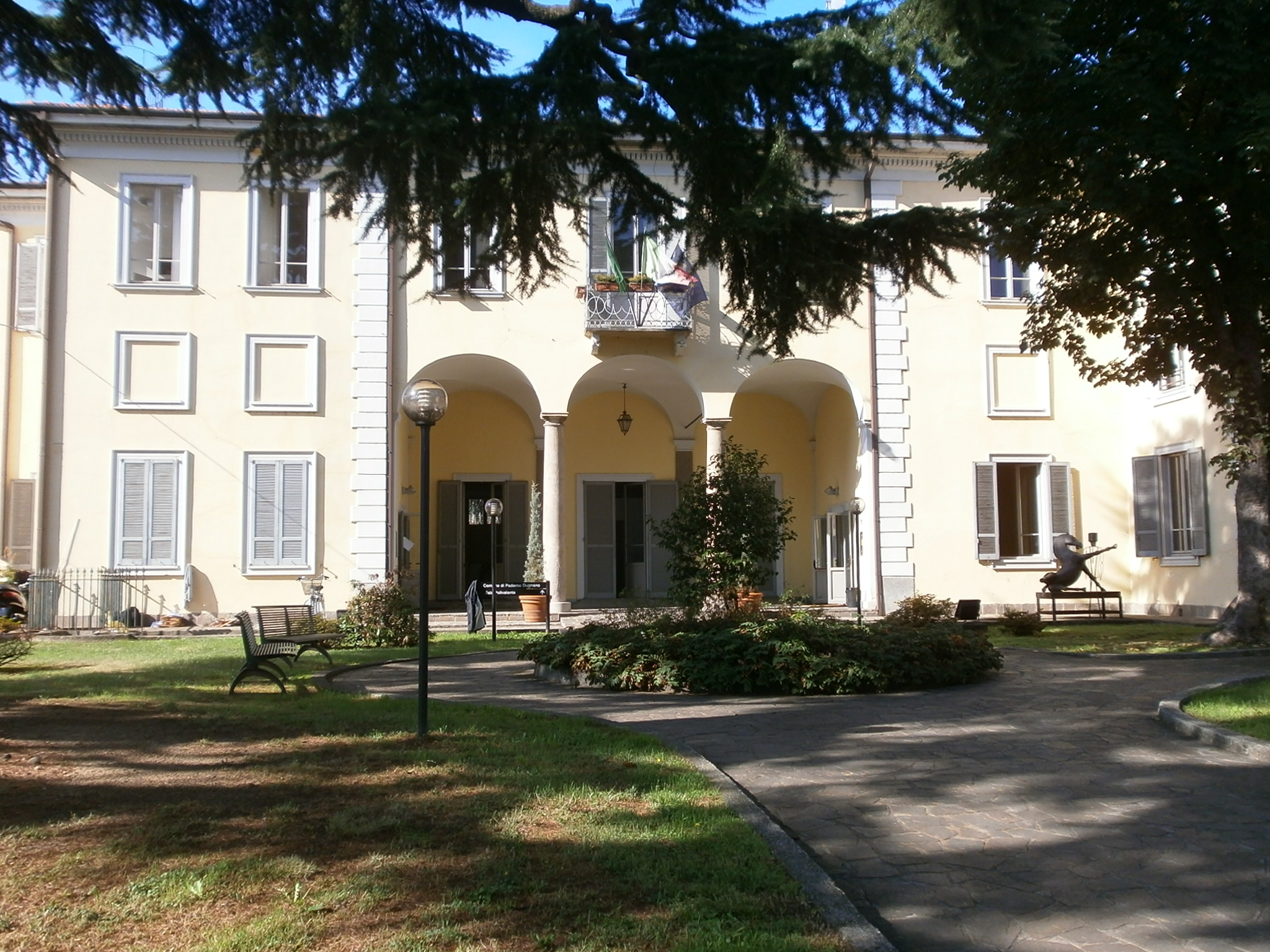 Villa Gargantini - 1752 - Incirano - frazione di Paderno Dugnano - 011